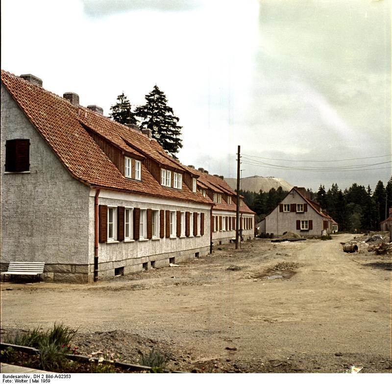 Susenburg, Wohnsiedlung Kalkwerke Wohnsiedlung, der Kalkwerke Susenburg bei Rübezahl/ Harz [Susenburg bei Rübezahl/ Harz, Wohnsiedlung der Kalkwerke] Information added by Wikimedia users.